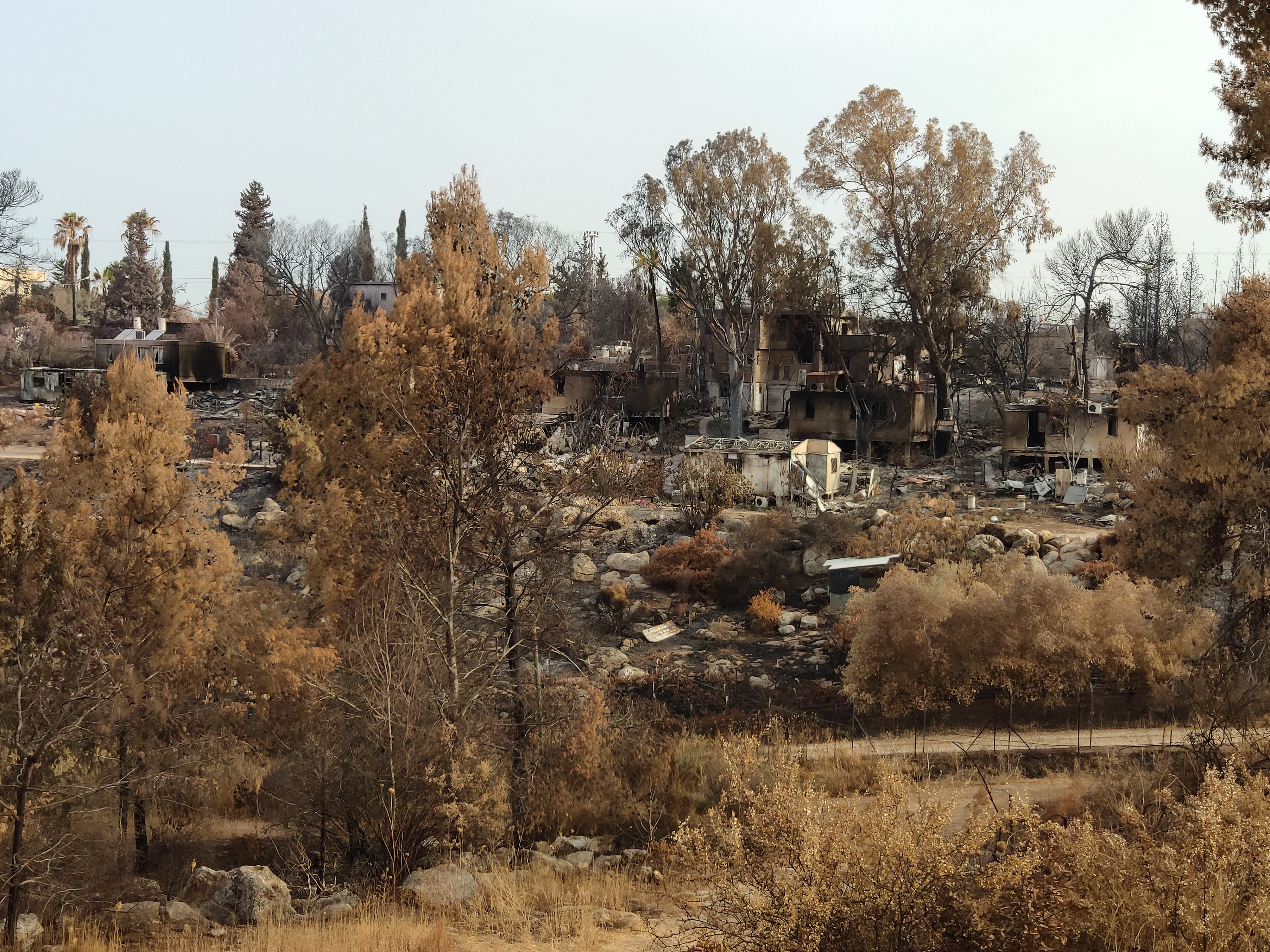 Mevo Modi'im after May 2019 fire